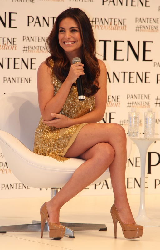 Ana Brenda-001